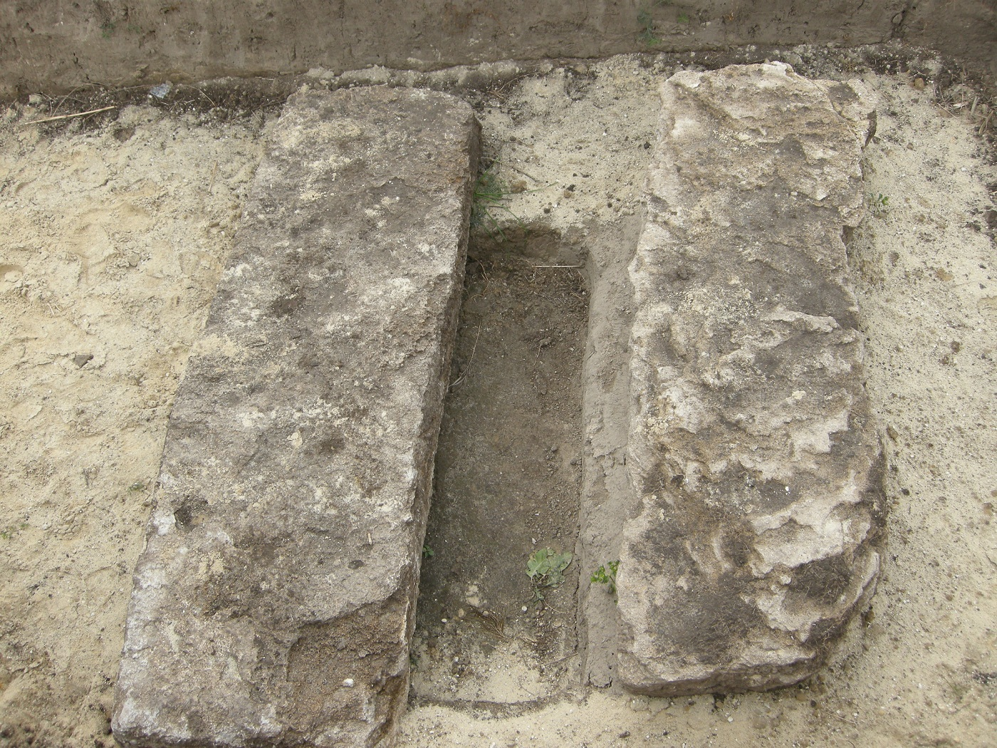 Кам`яні надмогильні плити на місці поховання 12-13 століть в урочищі Пастівник в селі Пересопниця.